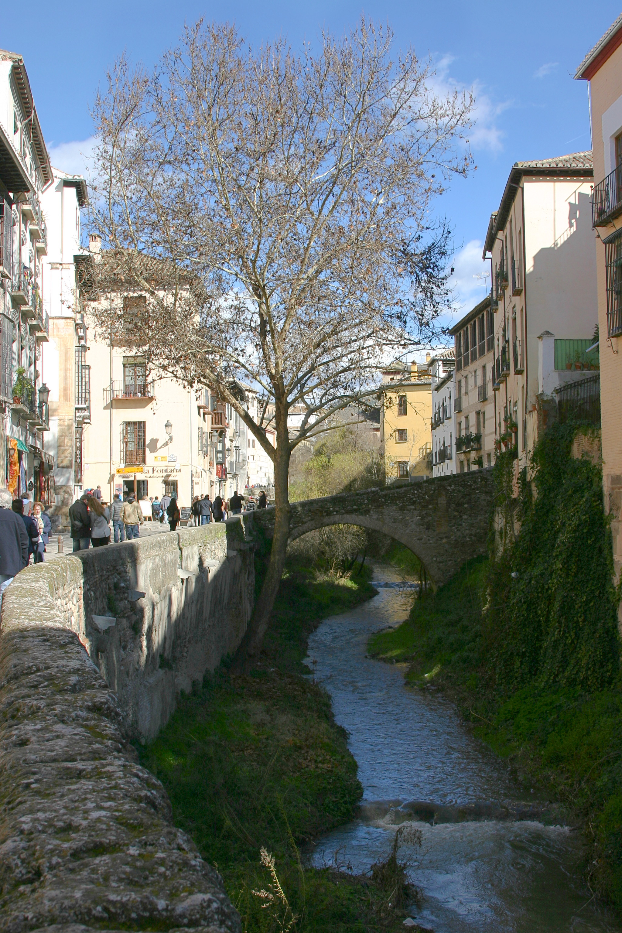 Carrera del Darro - Granada